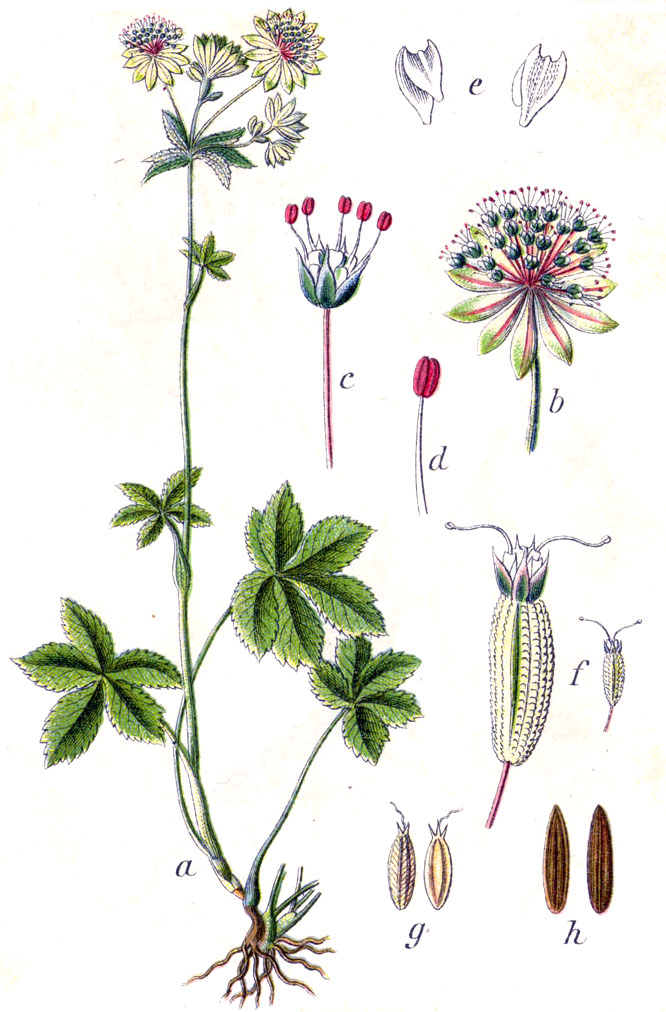 Astrantia major L. Original Caption Grosse Strenze, Astrantia major